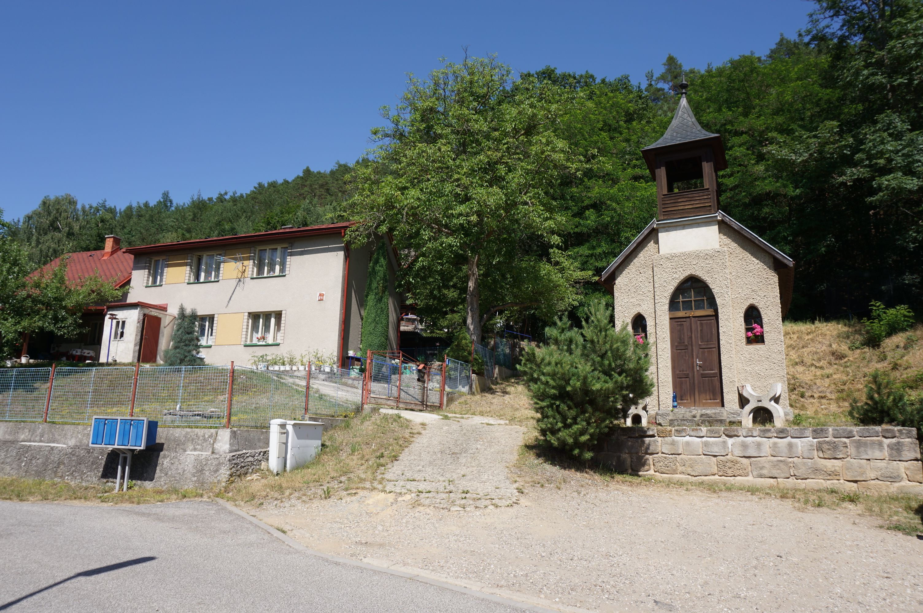 Skalany - čp. 21 a kaple se zvoničkou